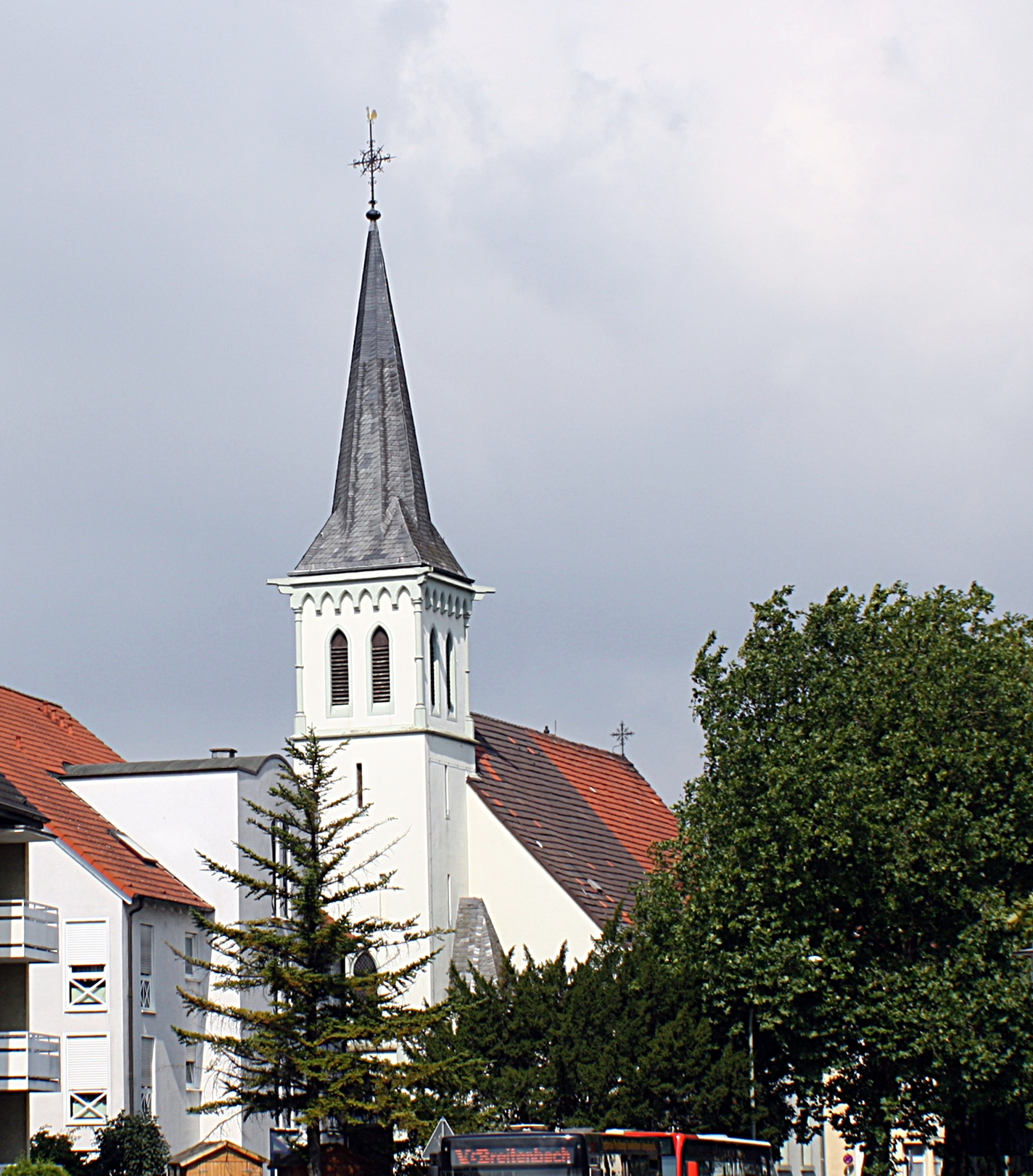 Werl, alte Evangelische Kirche